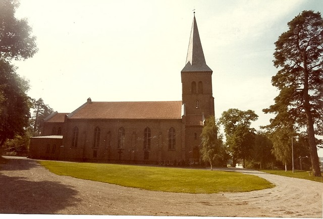 Stokke kirke